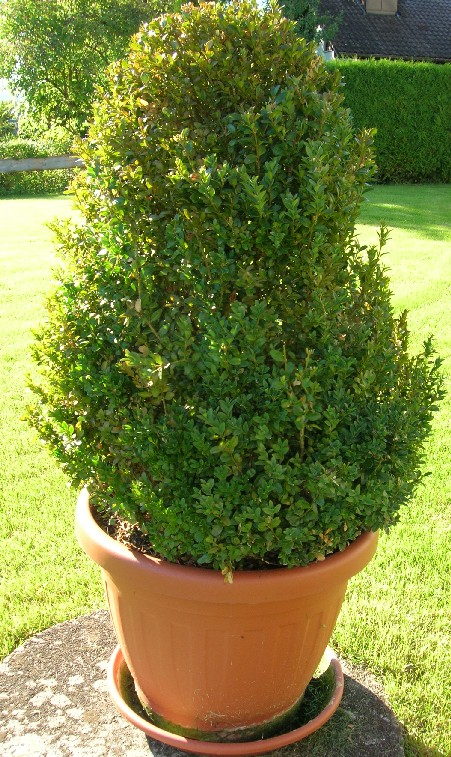 Selbst geschossenes Foto eines Buchsbaumes. Gemeinfrei